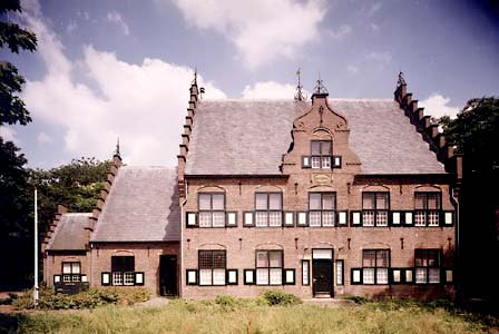 Museum De Wieger te Deurne. Het voormalige woonhuis van dorpsarts Hendrik Wiegersma.